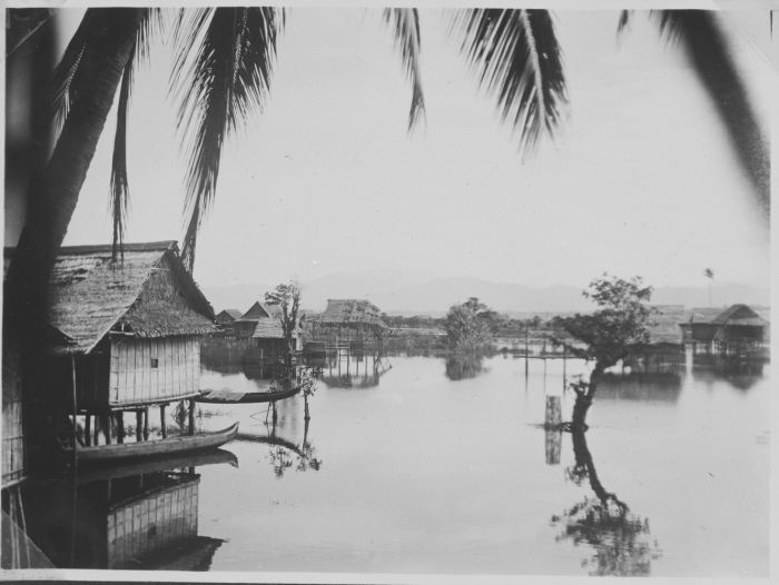 Foto. Paalwoningen van een dorp in het Limboto-meer